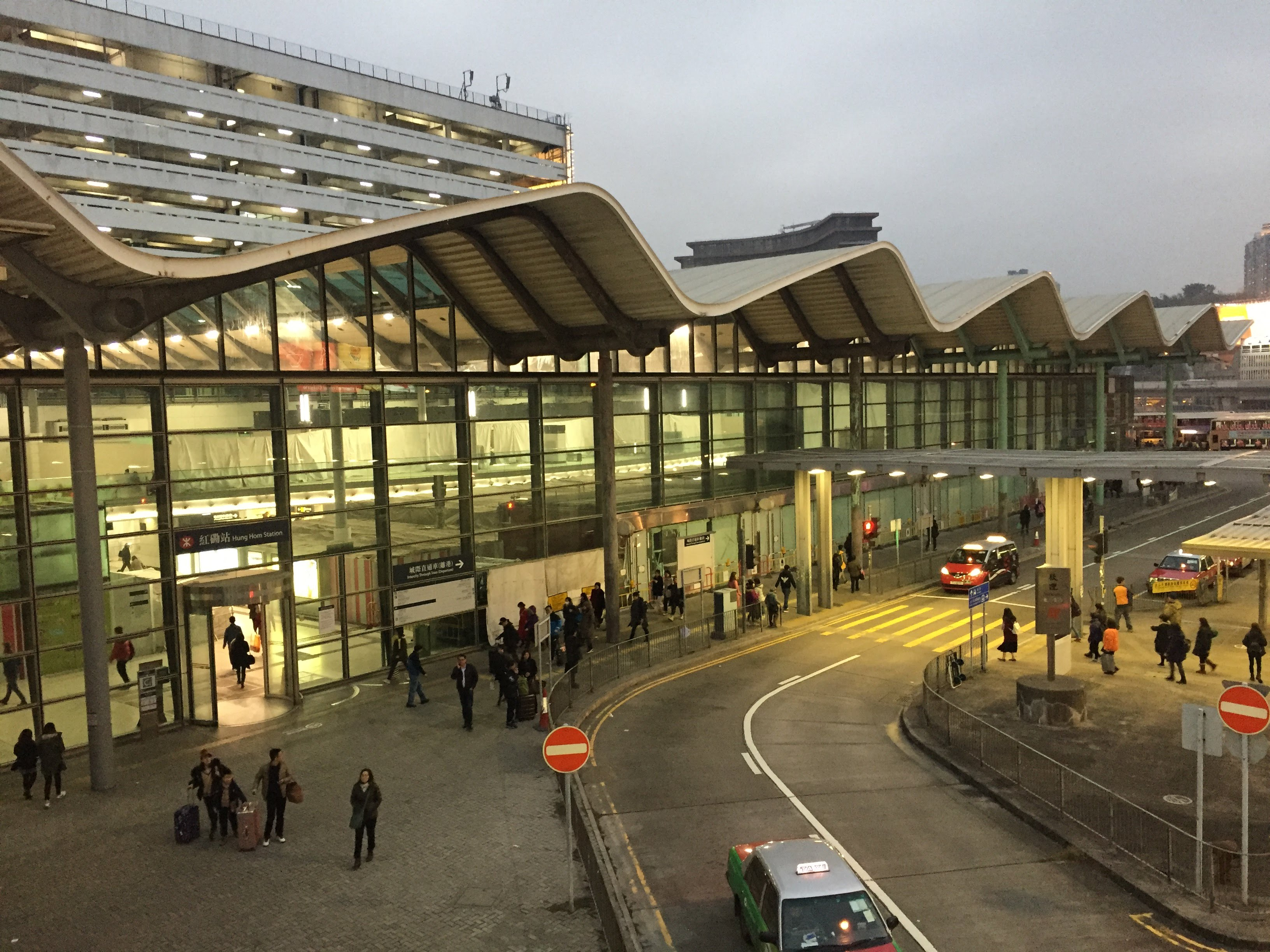 中文（香港）: 紅磡站C出口外觀